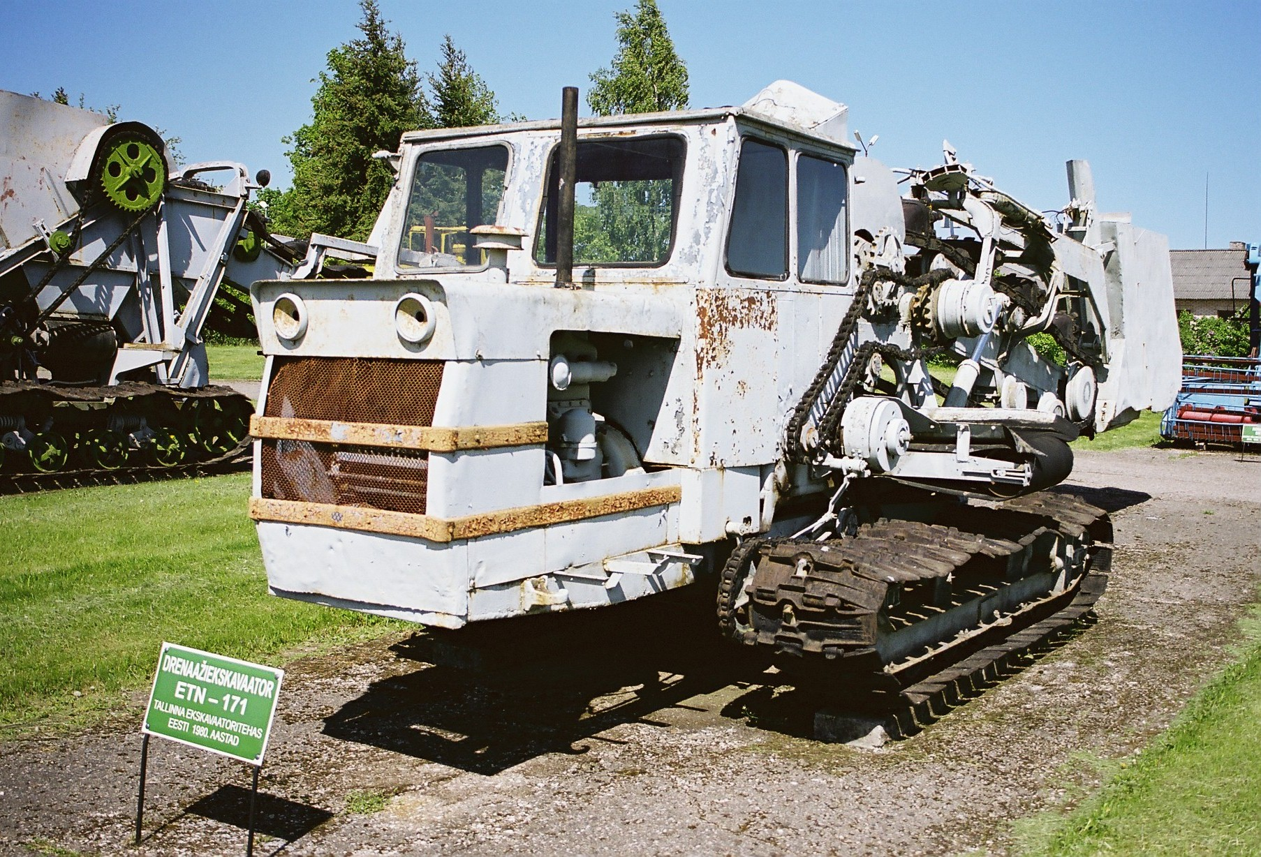 Drenaažiekskavaator ETN-171, Tallinna Ekskavaatoritehas, 1980-ndad, Eesti Põllumajandusmuuseum